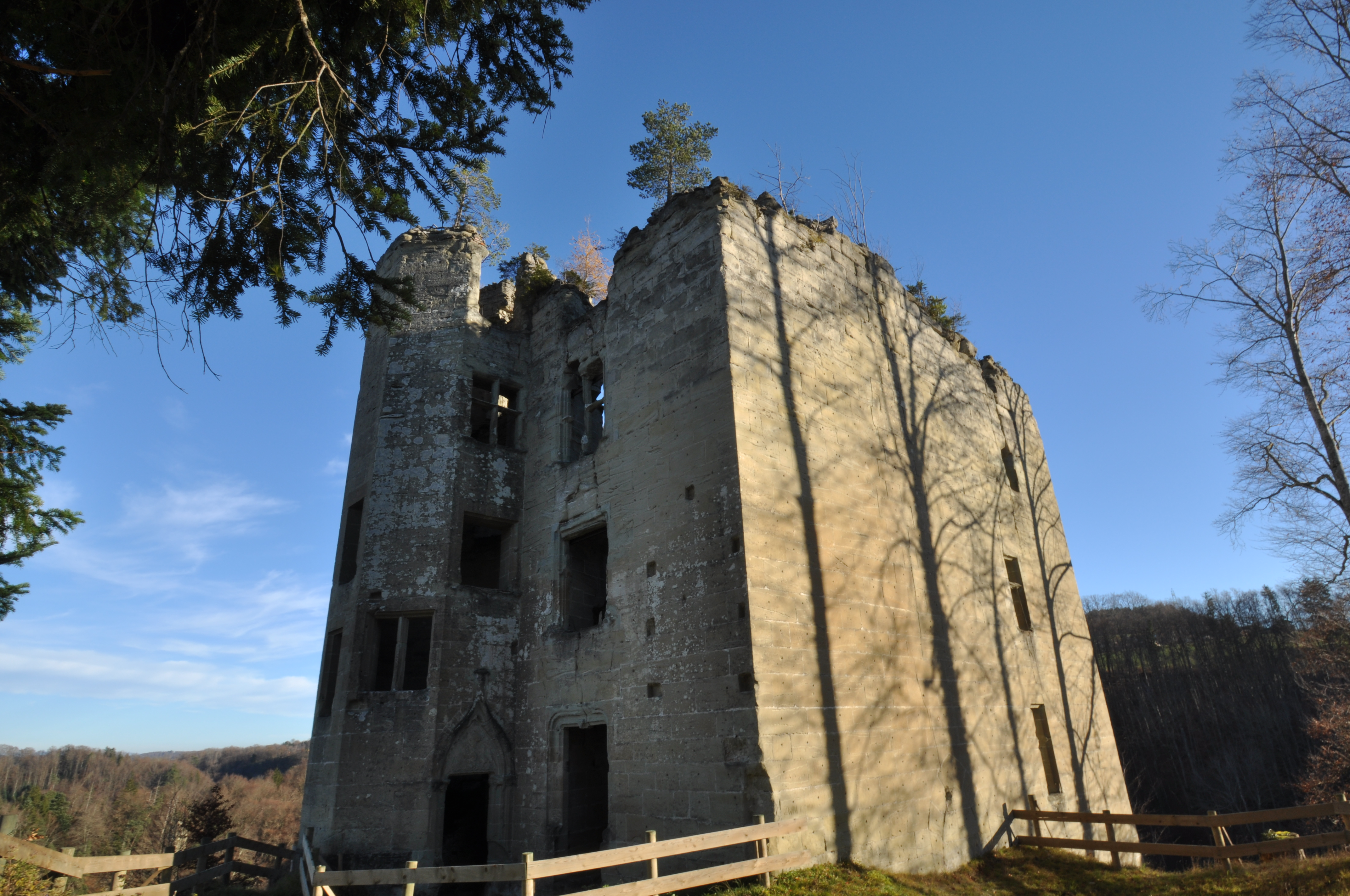 Ruines du château d'Ilens, sur la commune de Rossens dans le canton de Fribourg